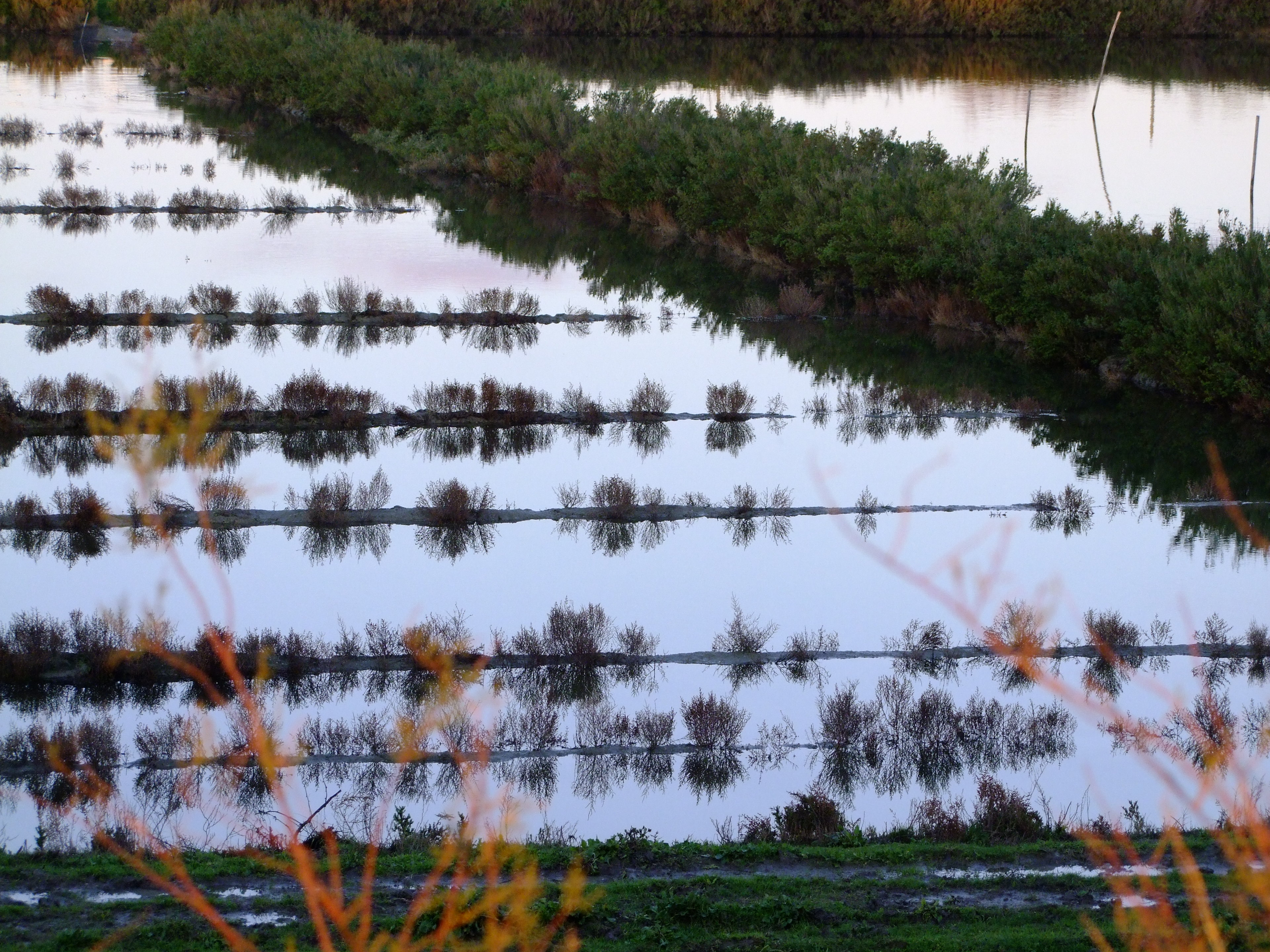 Le marais et ses plantes d'eau